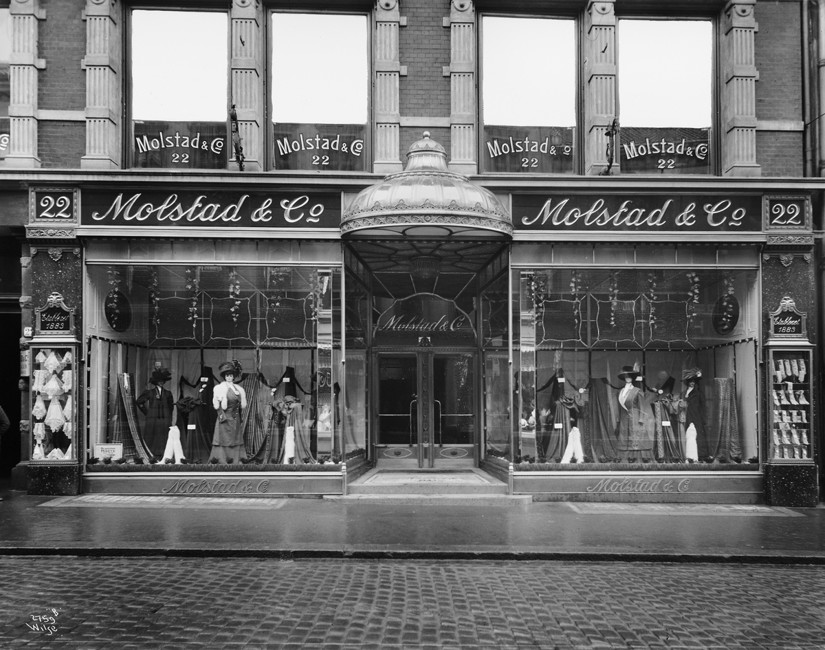 Molstad damekonfeksjon, Kongens gate 22, ca. 1910. Gården sto ferdig i 1893, arkitekt Victor Nordan. Foto: Anders Beer Wilse. Foto eiet av Oslo Museum. Referanse på digitaltmeusum.no: OB.Y4392